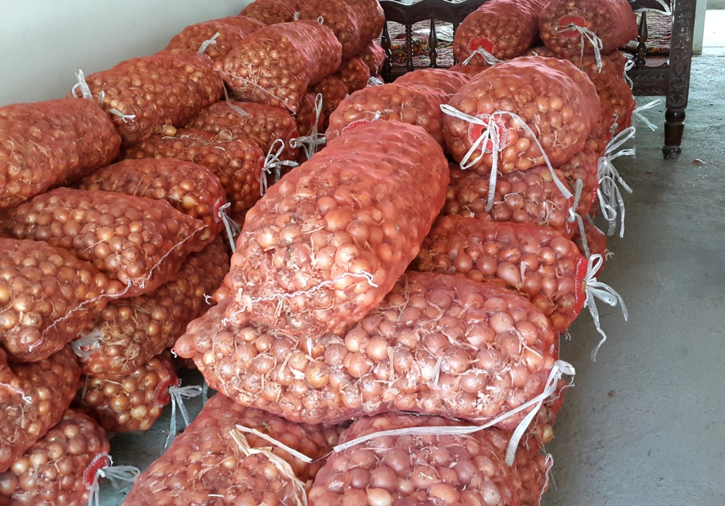 Лук-матка готов к посеву для получения семян лука.